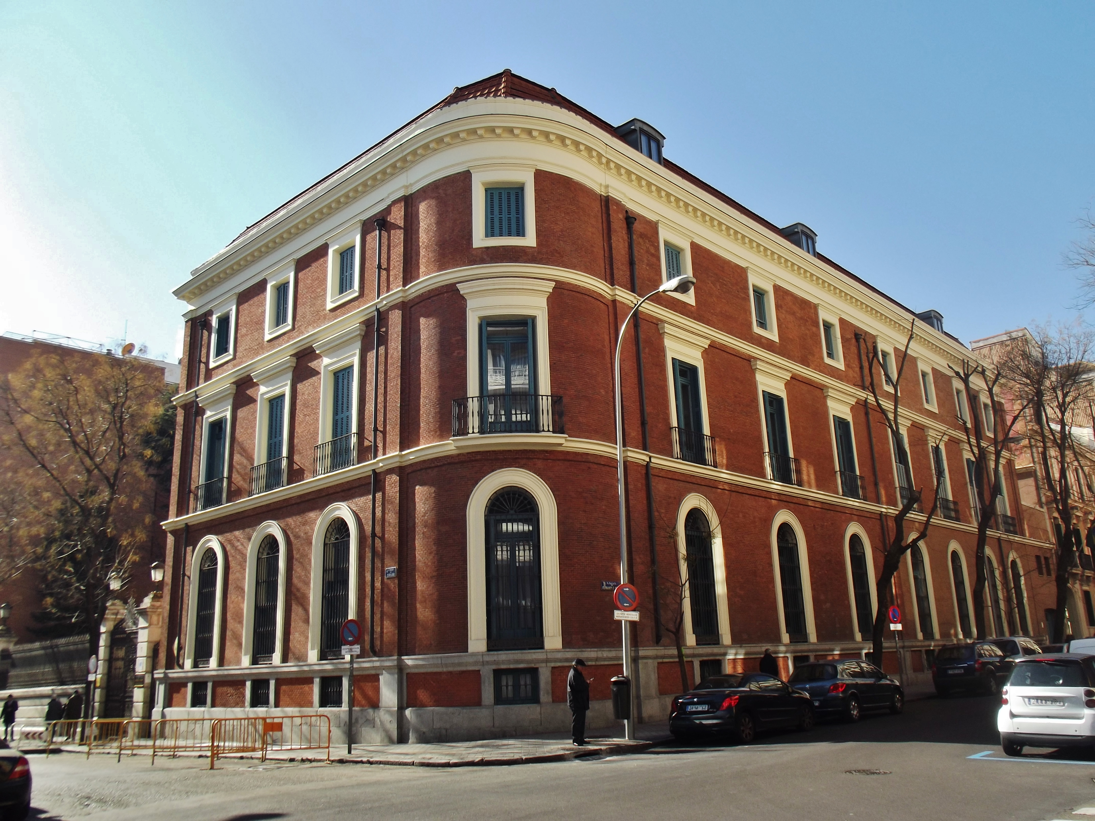 Palacio de Zurbano, Madrid. This is a retouched picture, which means that it has been digitally altered from its original version. Modifications: Distorted car plates.